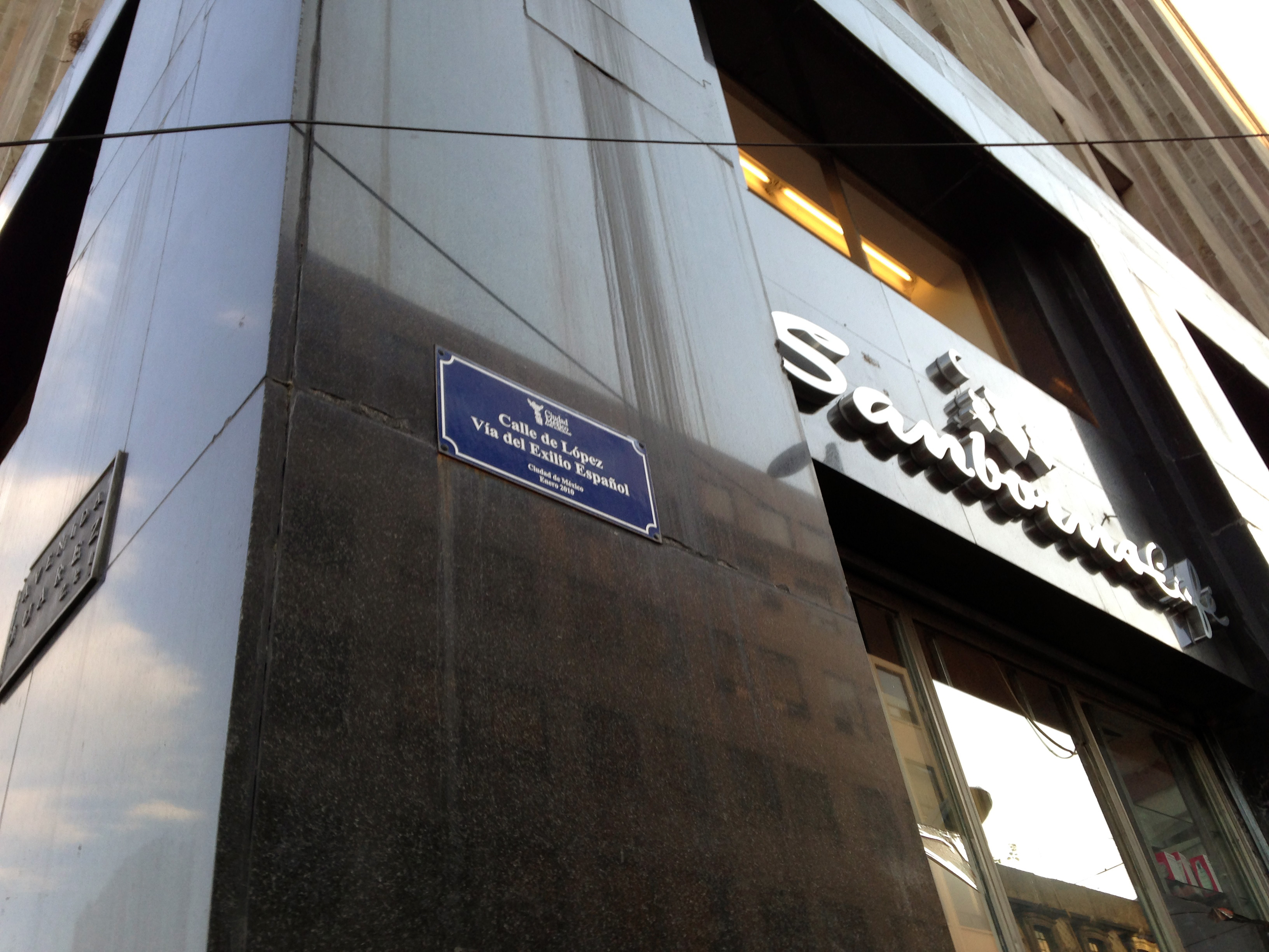 Calle de López, renombrada como Vía del Exilio Español en la Ciudad de México